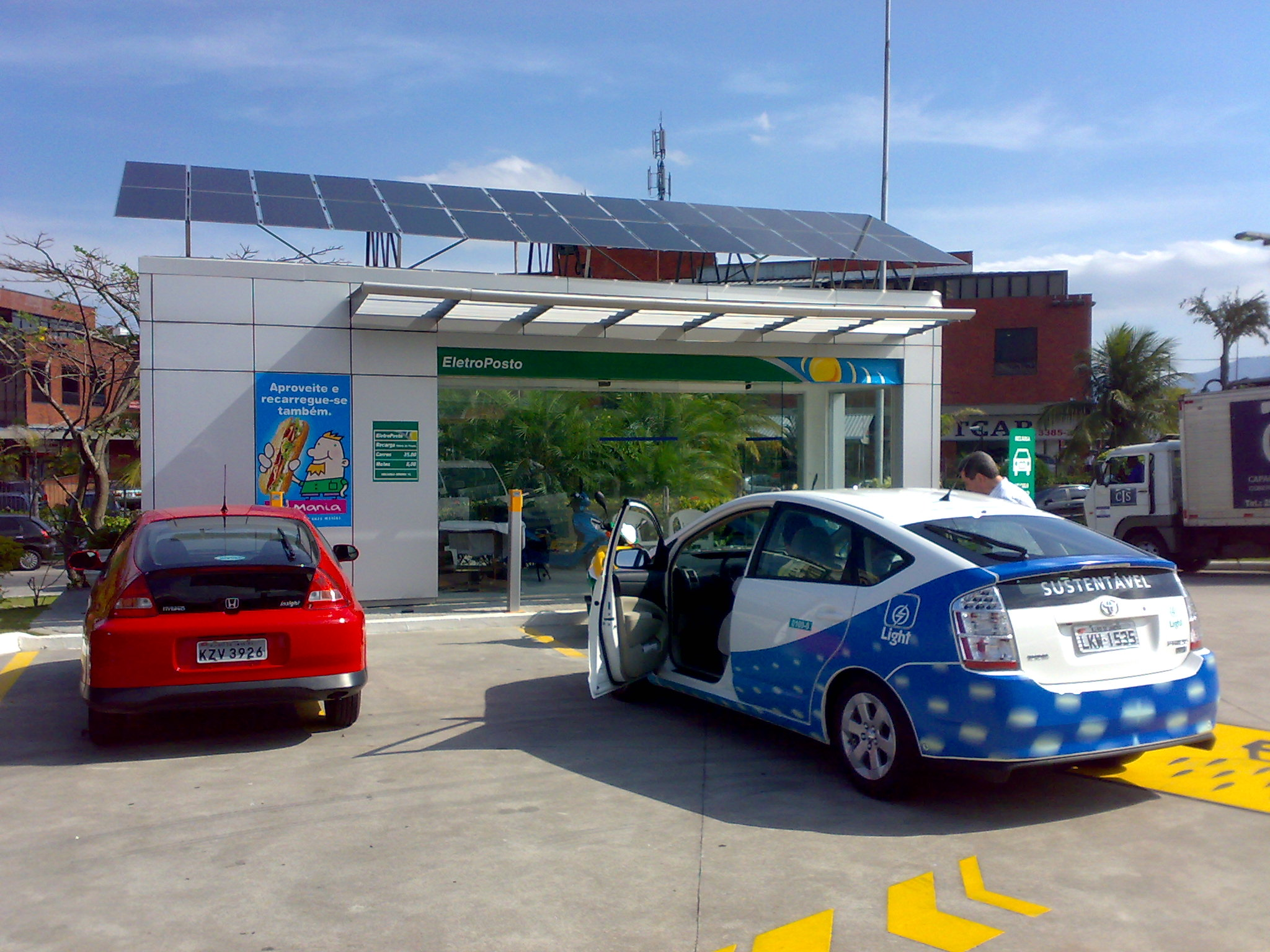 Honda Insight de primeira geração e Toyota Prius de segunda geração estacionados em frente ao primeiro eletroposto do Brasil.